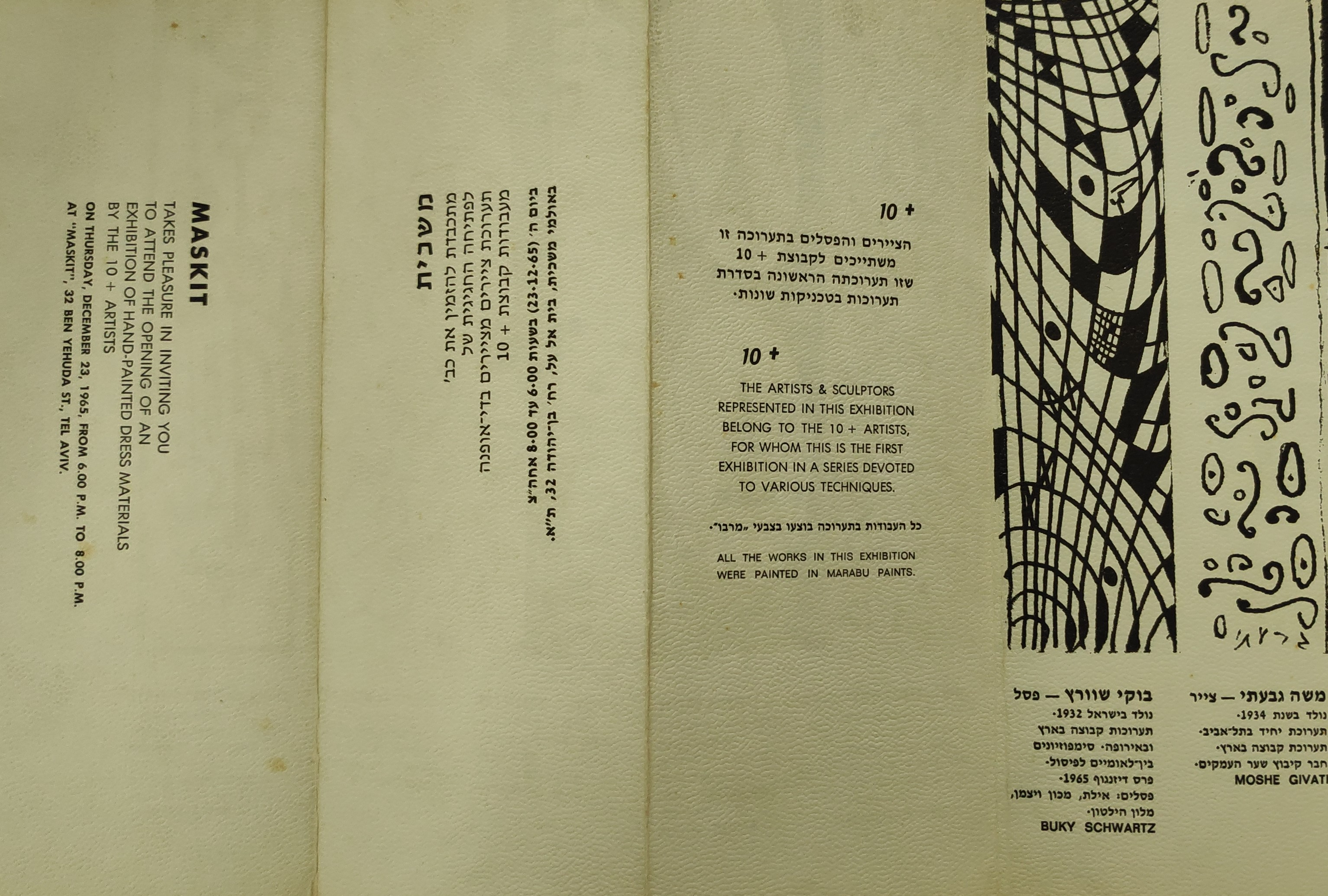 מתוך האוסף של בנו כלב